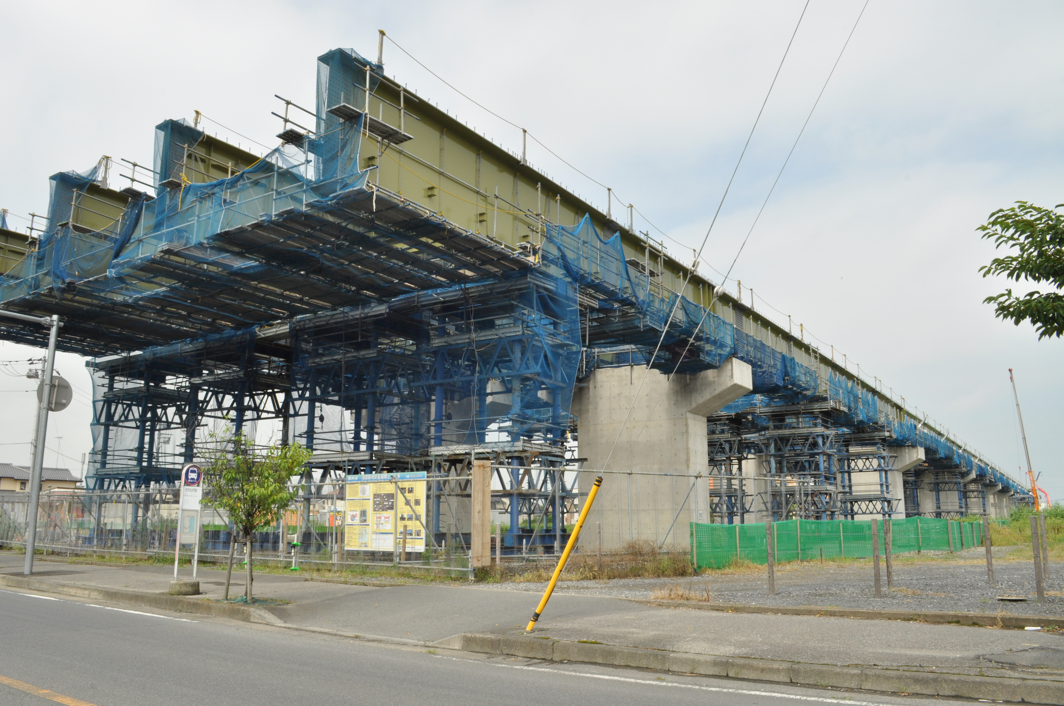 建設中の首都圏中央連絡自動車道を埼玉県道318号並塚幸手線から臨む